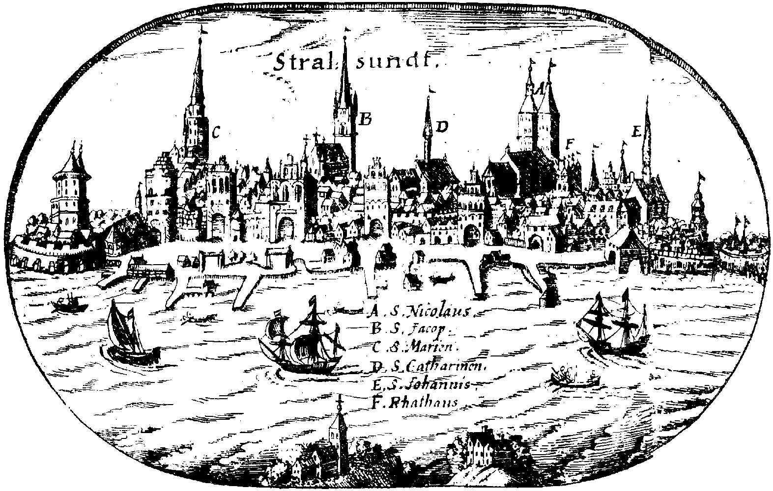 Ansicht von Stralsund